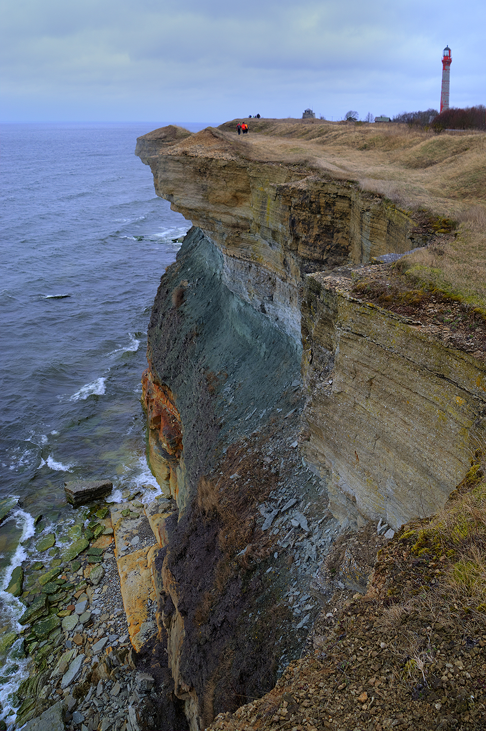 Pakri